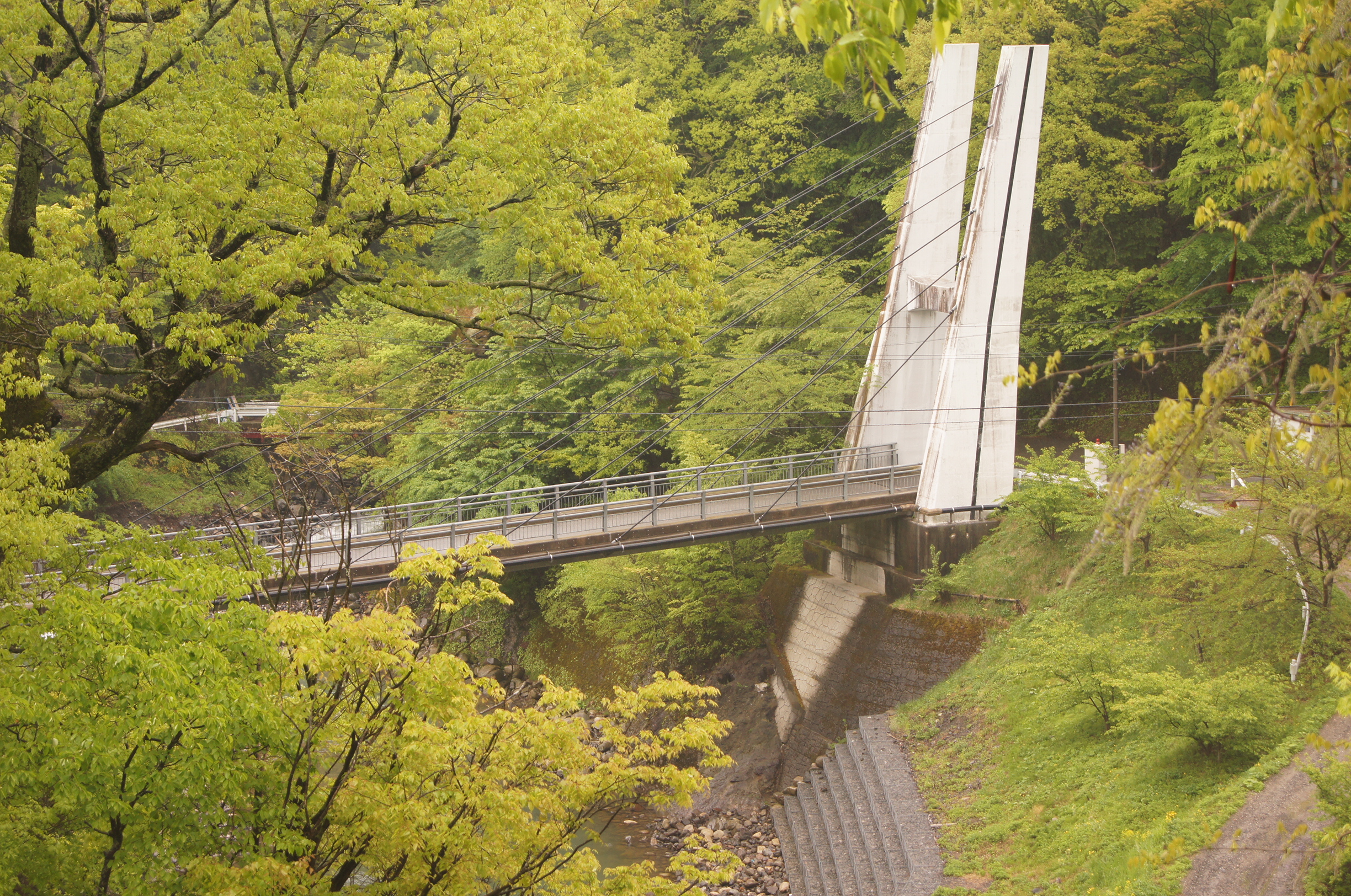 長野県松本市安曇の島々と橋場をつなぐ梓川にかかる橋